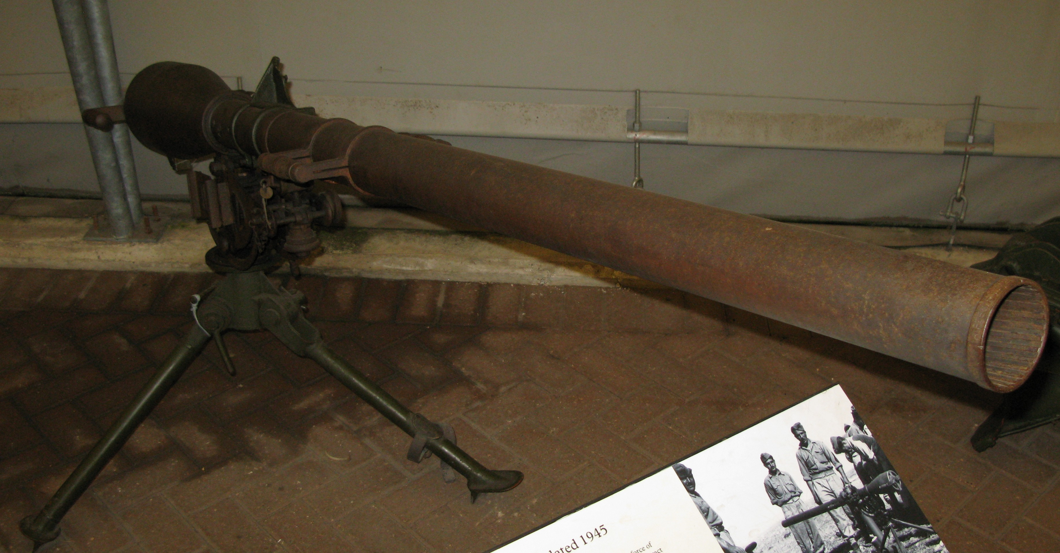 M20 75mm recoilless rifle